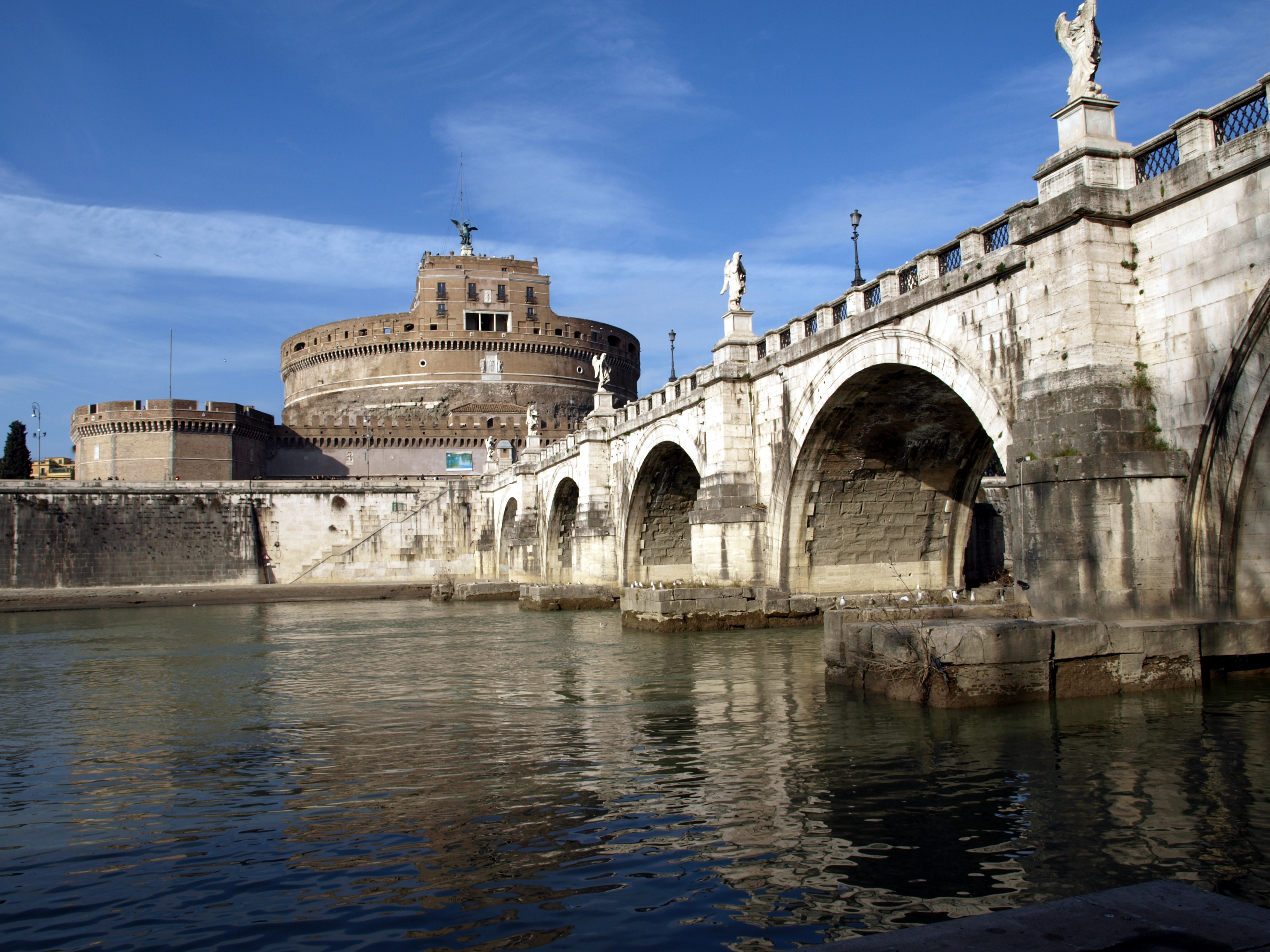 Engelsborg (Castel Sant'Angelo) set fra Tiberen.